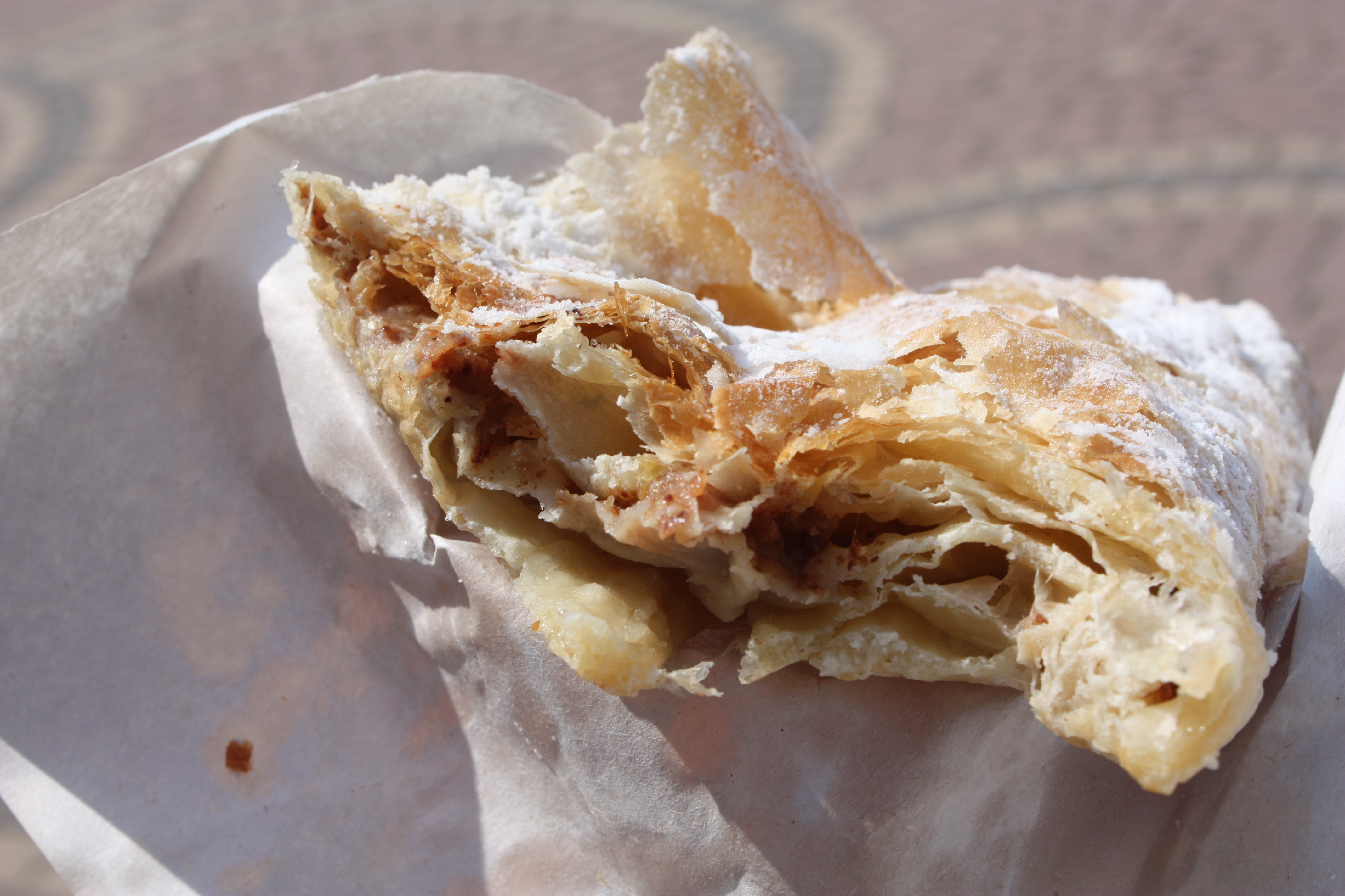 Banitsa Baniza баница Banica, in Sofia,Bulgaria